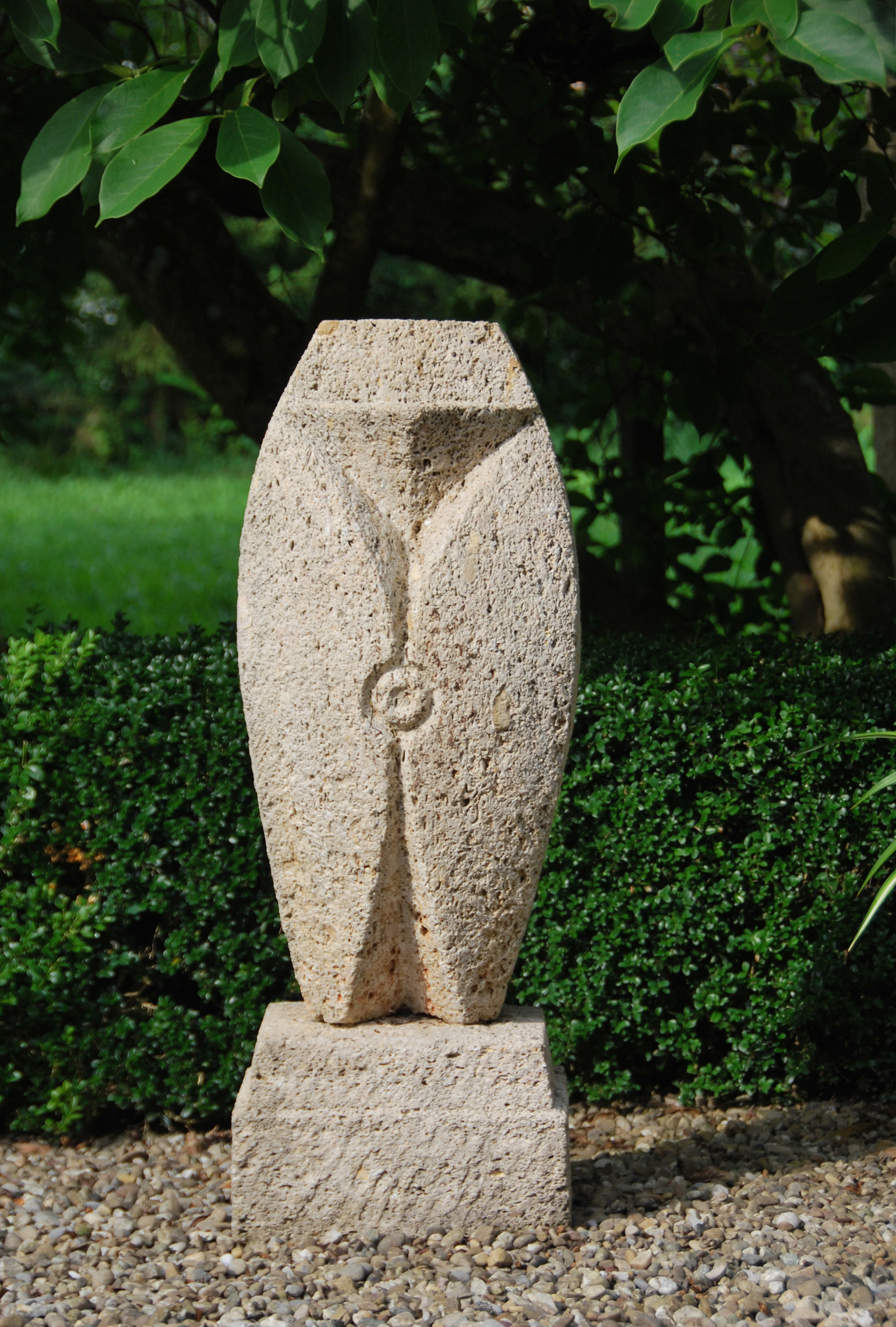 Walter Gürtler: Gotische Frau, Muschelkalk, 1958, im Privatbesitz von Jeanne Schneeberger